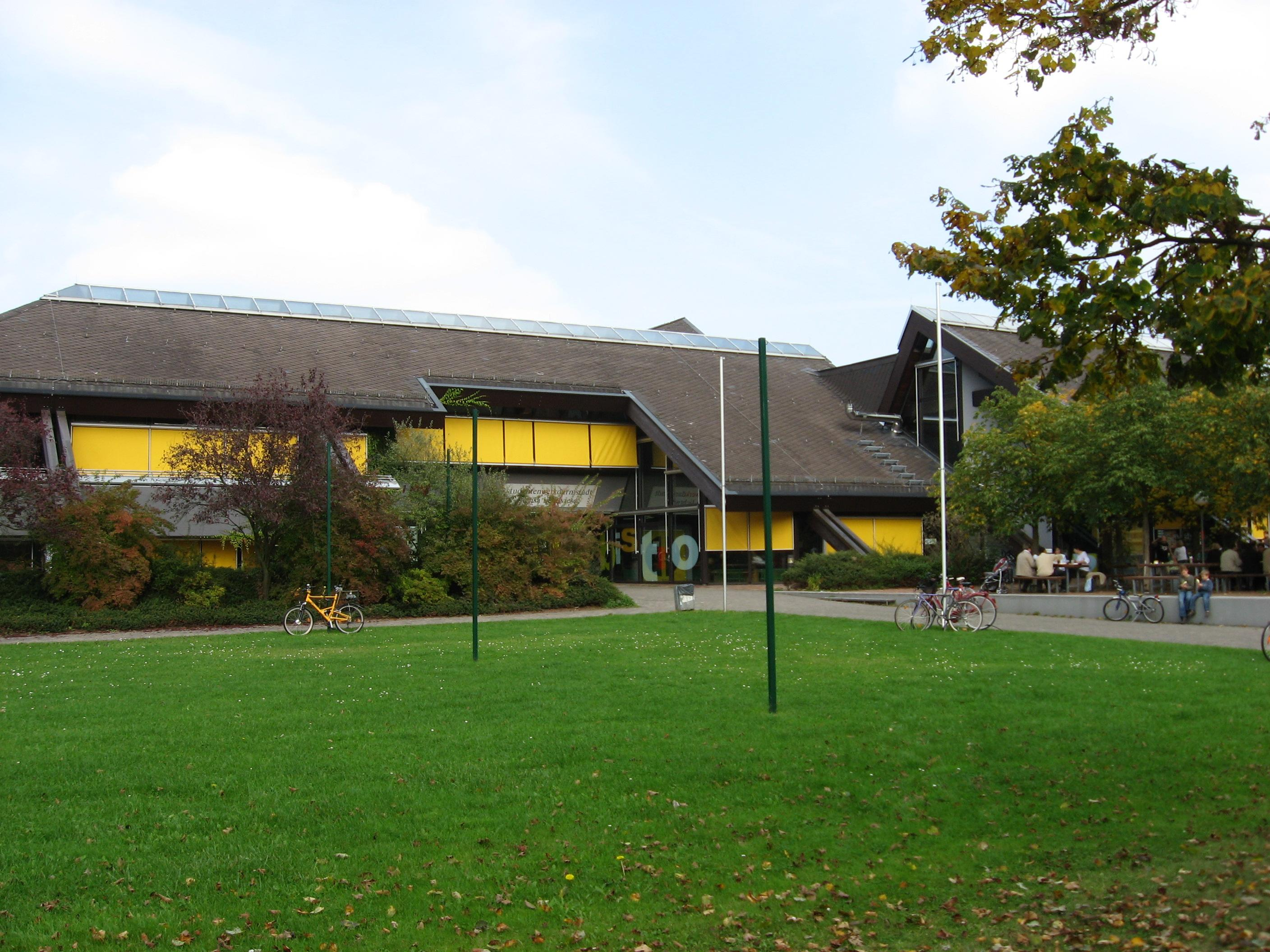 Der Haupteingang der Mensa Lichtwiese (L4 01), TU Darmstadt